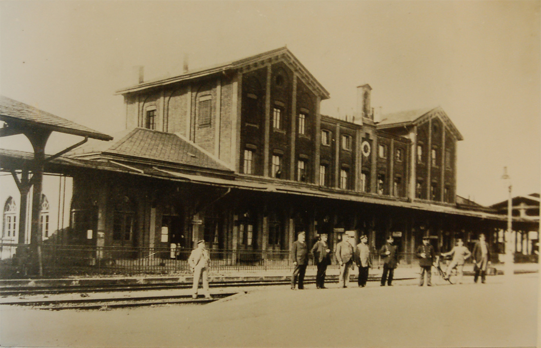 Bahnhof Nördlingen, um 1900